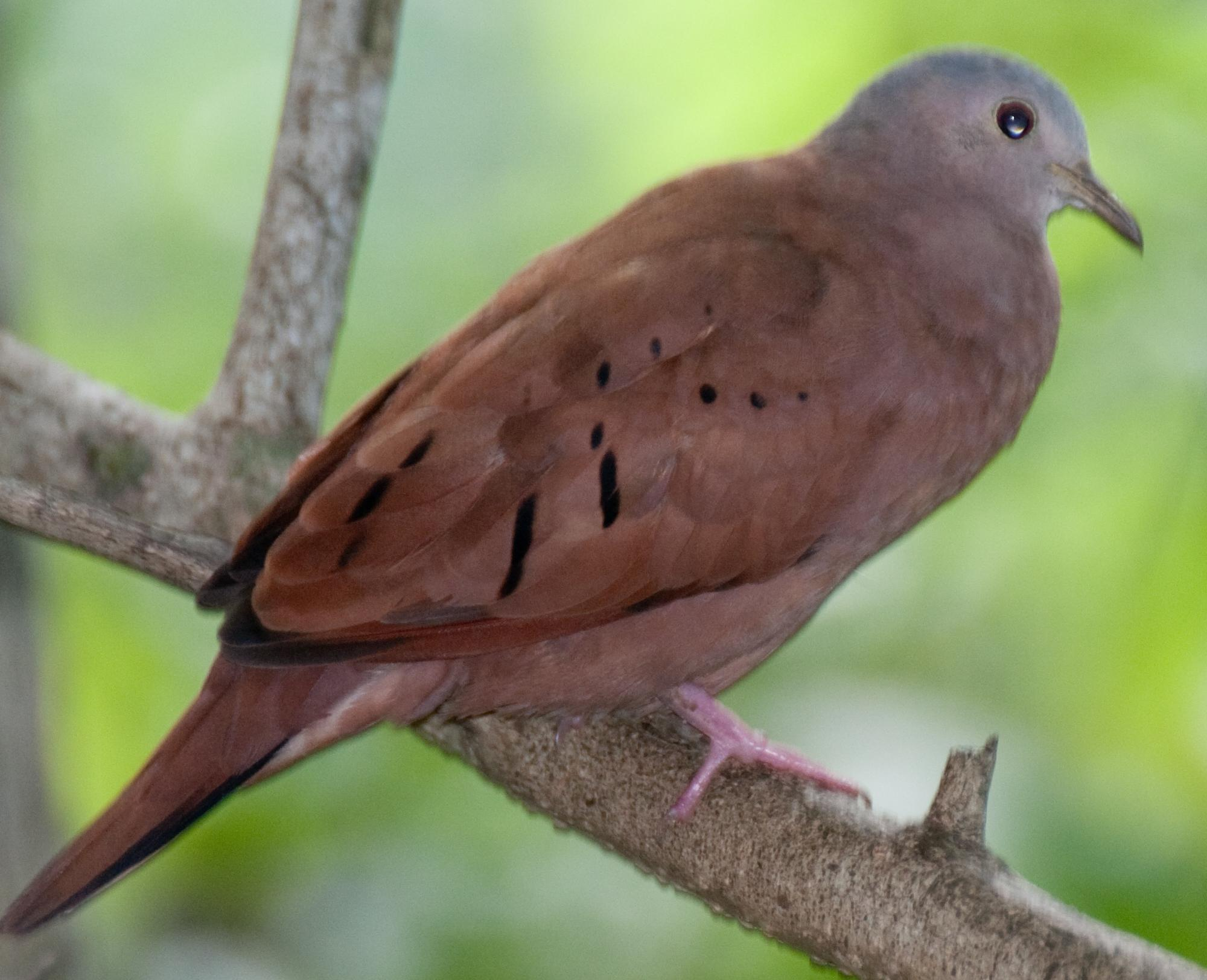 Columbina talpacoti